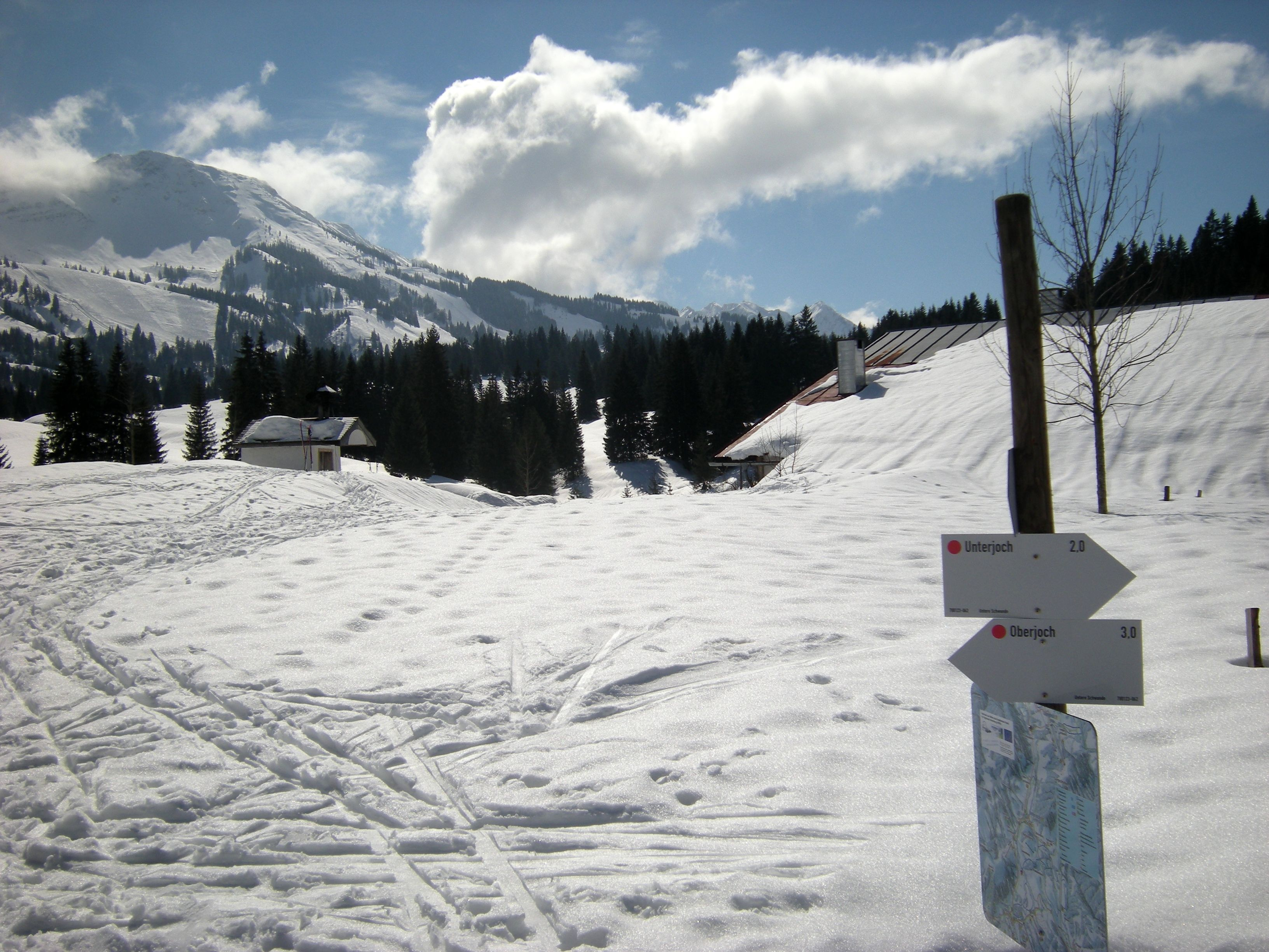 Loipe auf dem Oberjoch, Wegweiser